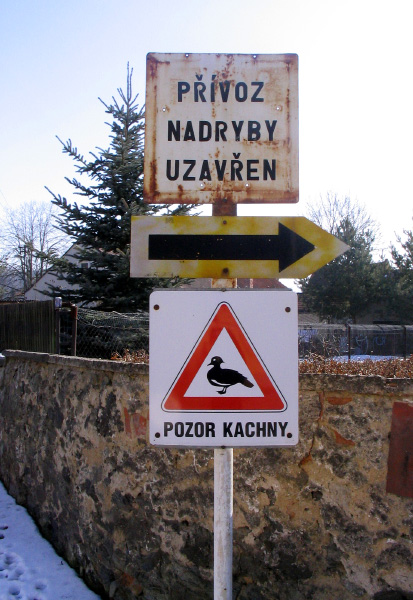 Nadryby, kuriozní dopravní značka Pozor, kachny.